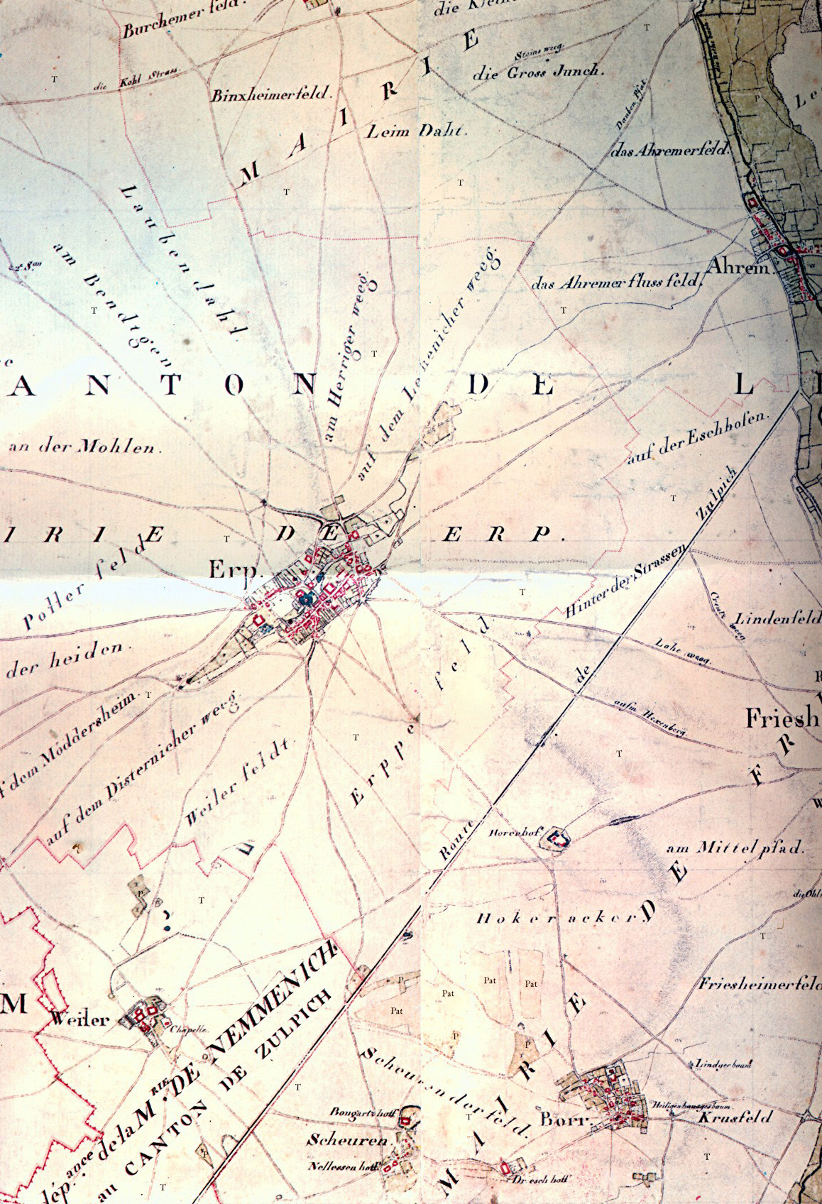 Kartenaufnahme der Rheinlande, Tranchot und von Müffling 1803-1820. Teilstück der alten Römerstraße zwischen Ahrem und Zülpich, der „Route de Zülpch“